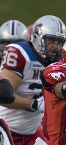 Joffrey Reynolds